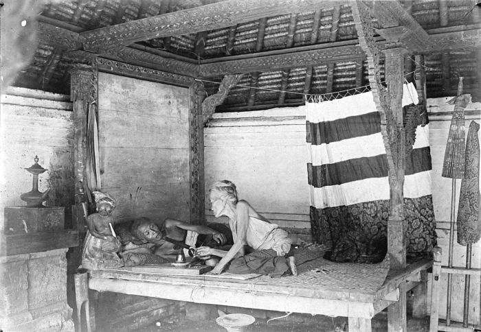 Repronegatief. Opiumschuiven, Bali